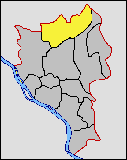 خريطة موقع الوحدة المحلية لقرية أبو مندور بمركز دسوق